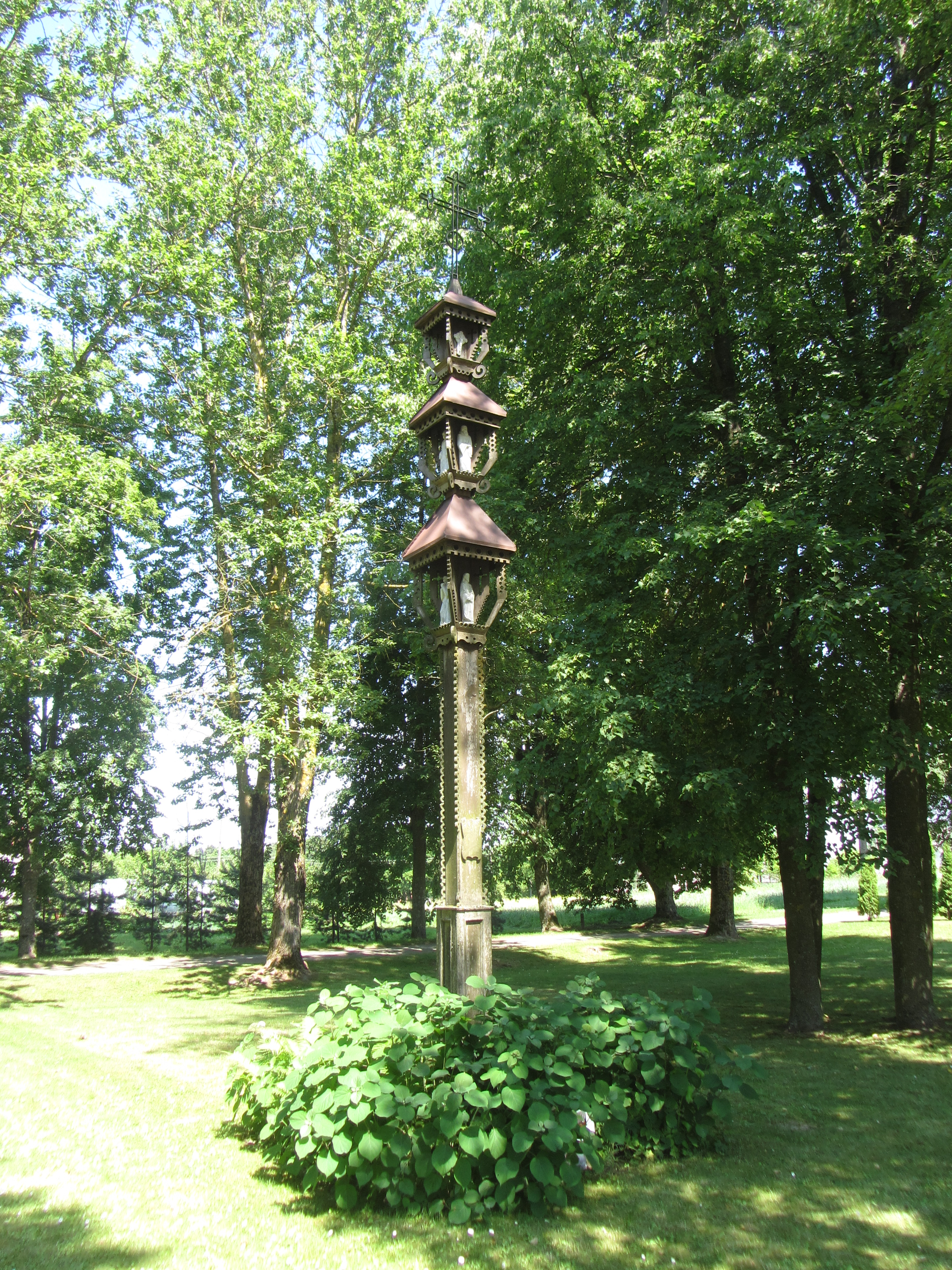 Lyduokiai, Lithuania